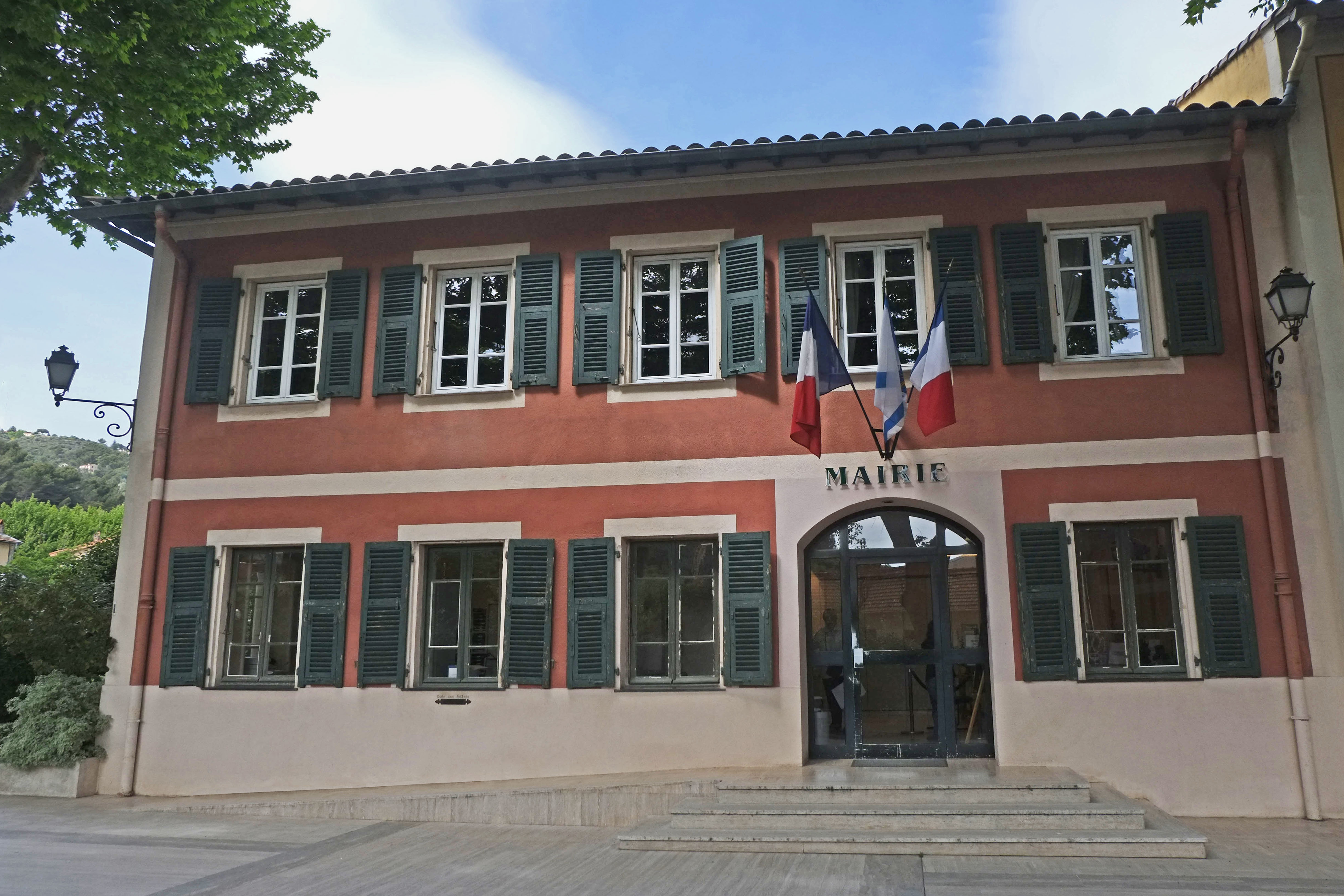 La mairie de Saint-André-de-la-Roche